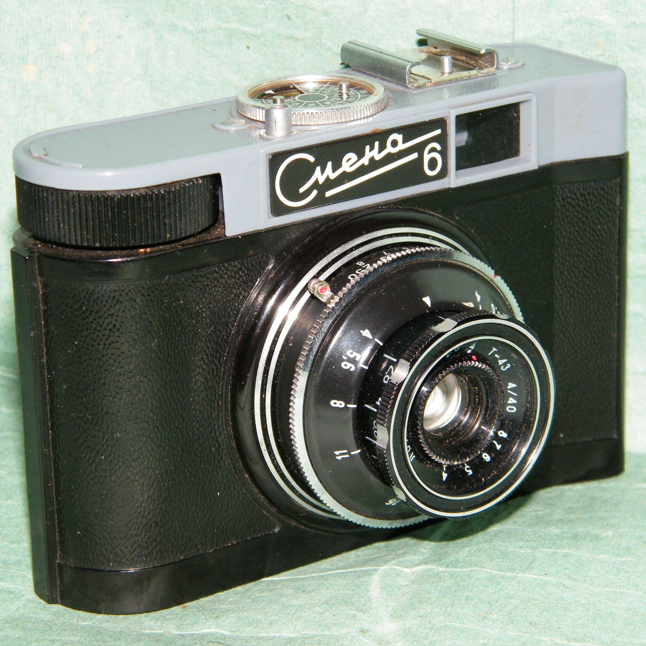 Smena 6